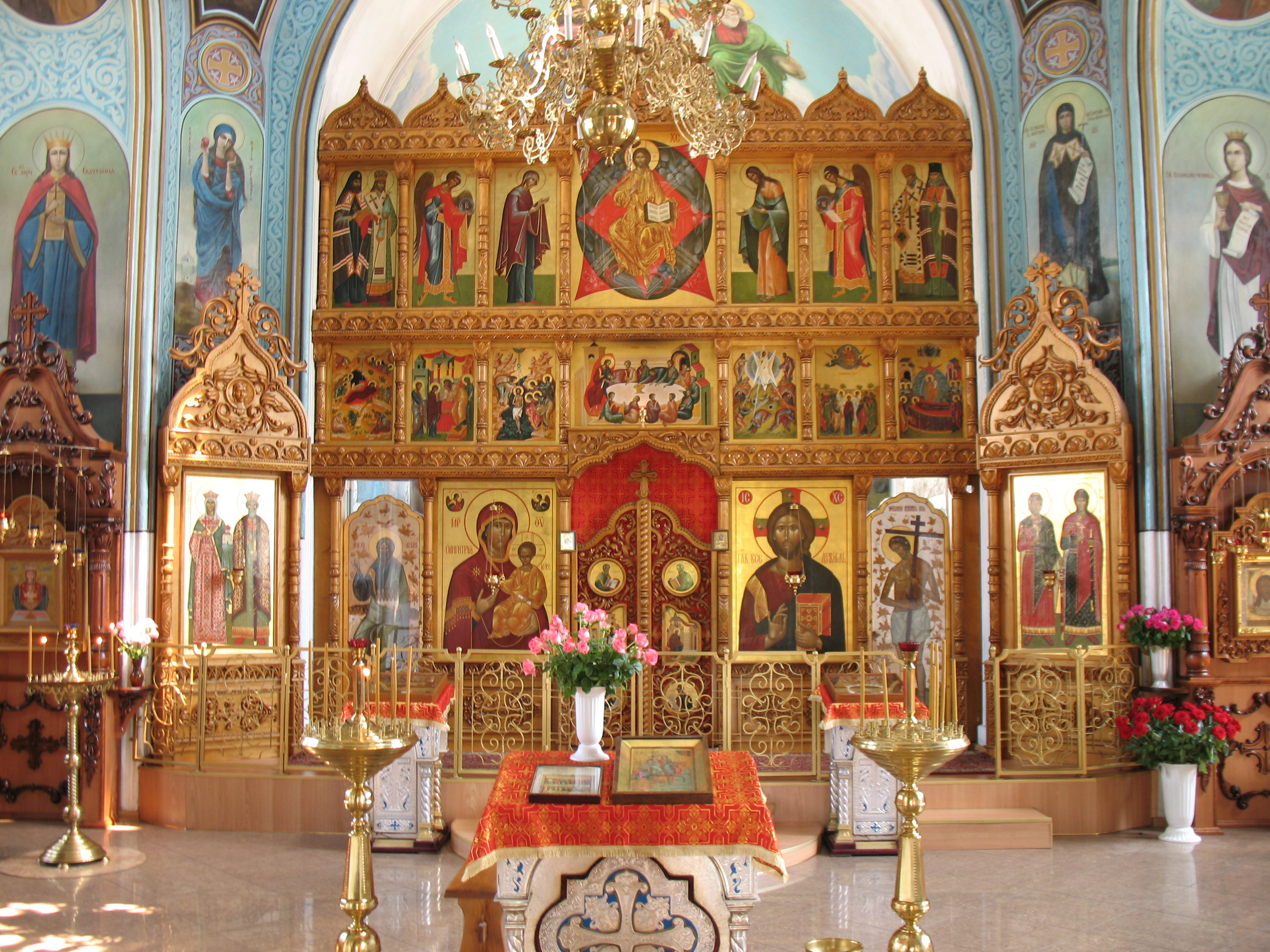 Борисо-Глебский православный женский монастырь (Водяное, Изюмская епархия РПЦ). Храм 1905 года. Иконостас. Икона Бориса и Глеба - справа от иконостаса.